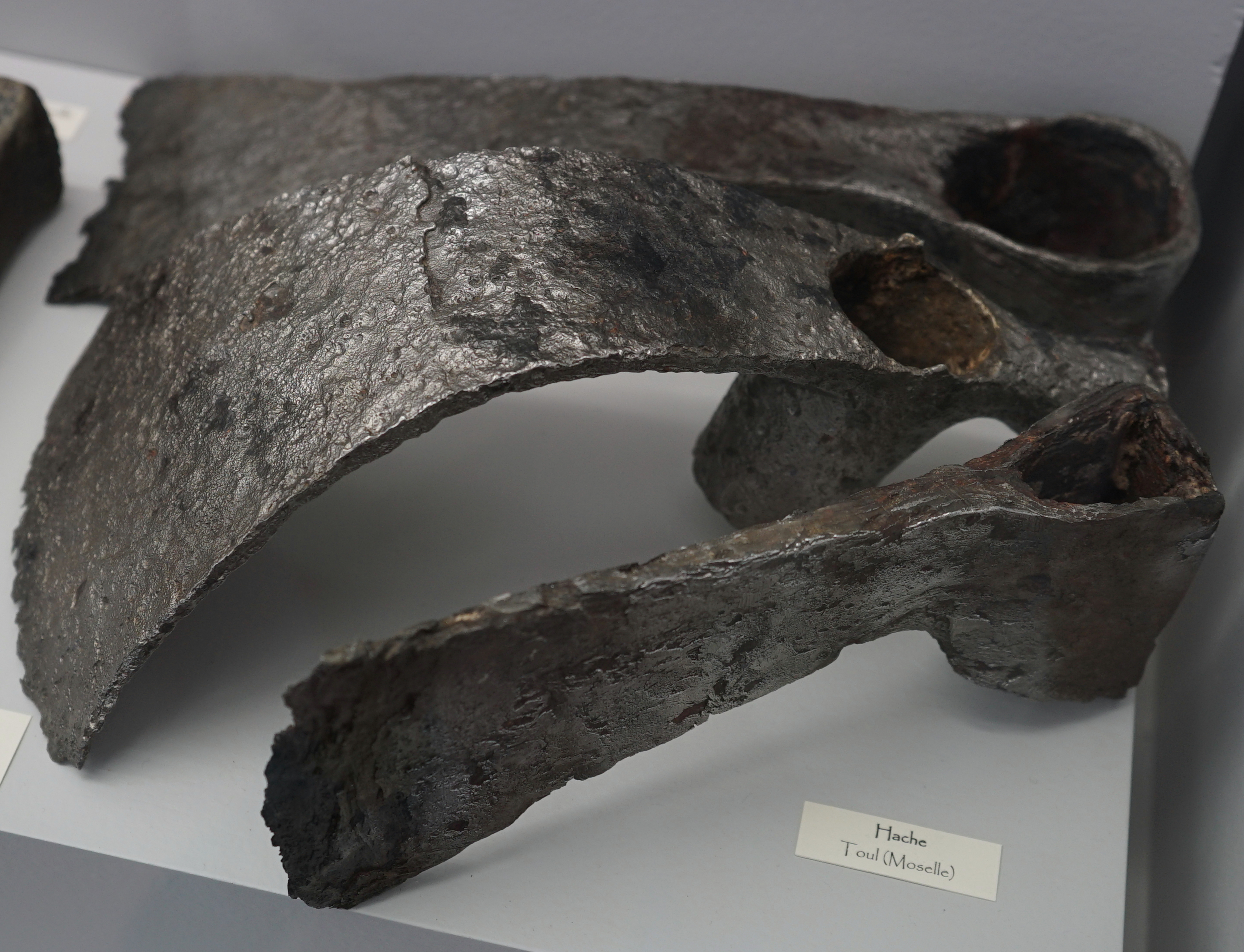 présenté au musée de Toul.